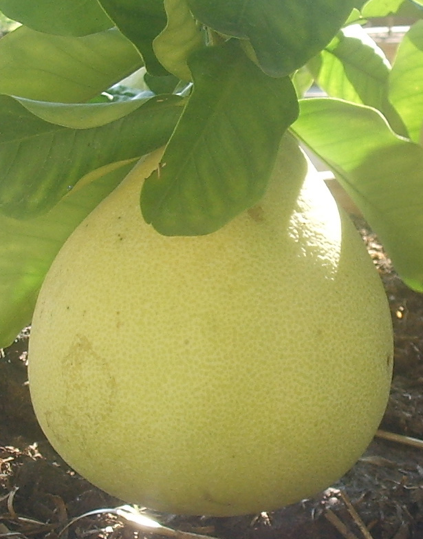 Parco di Villa Reale di Castello (Villa di Castello) Collection of citrus (collezione di agrumi rari)in Florence, italy in Florence, Italy